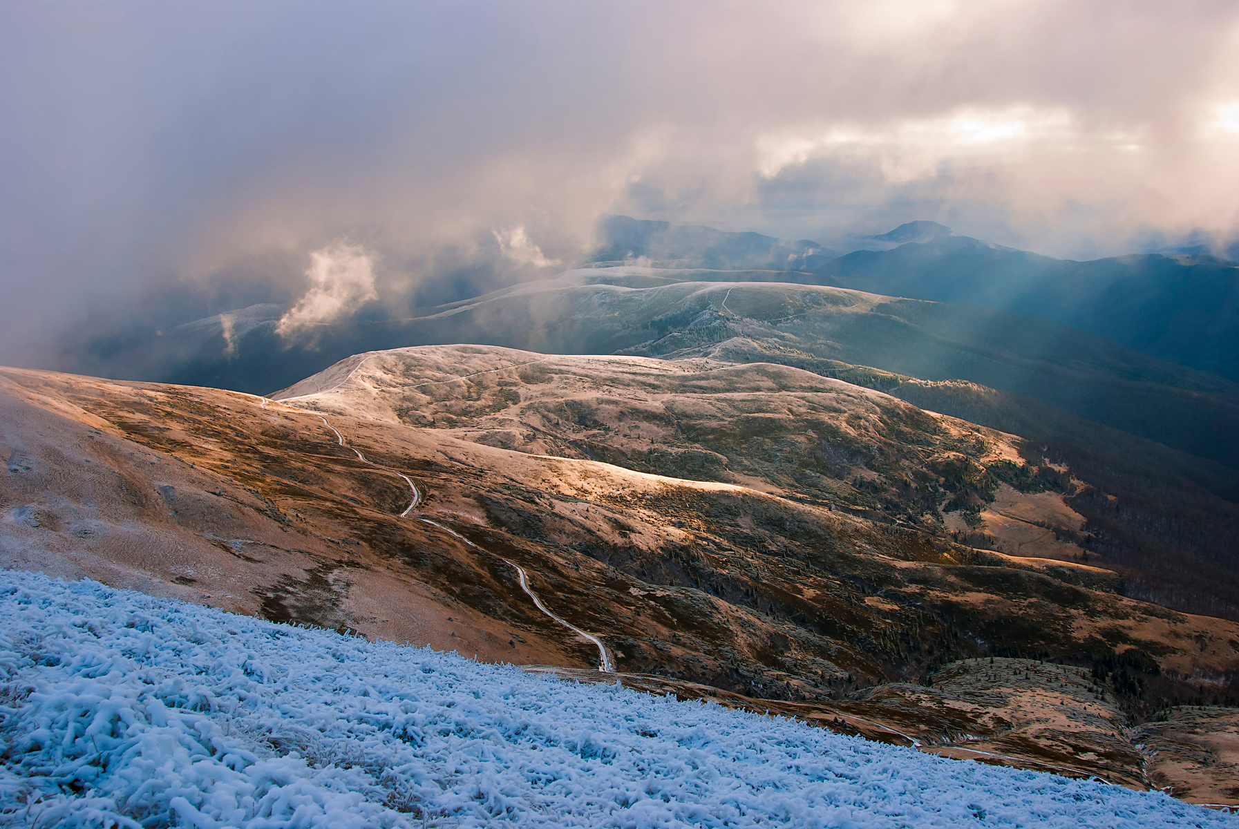 Карпатський біосферний заповідник, Рахівський, Тячівський, Хустський, Виноградівський райони